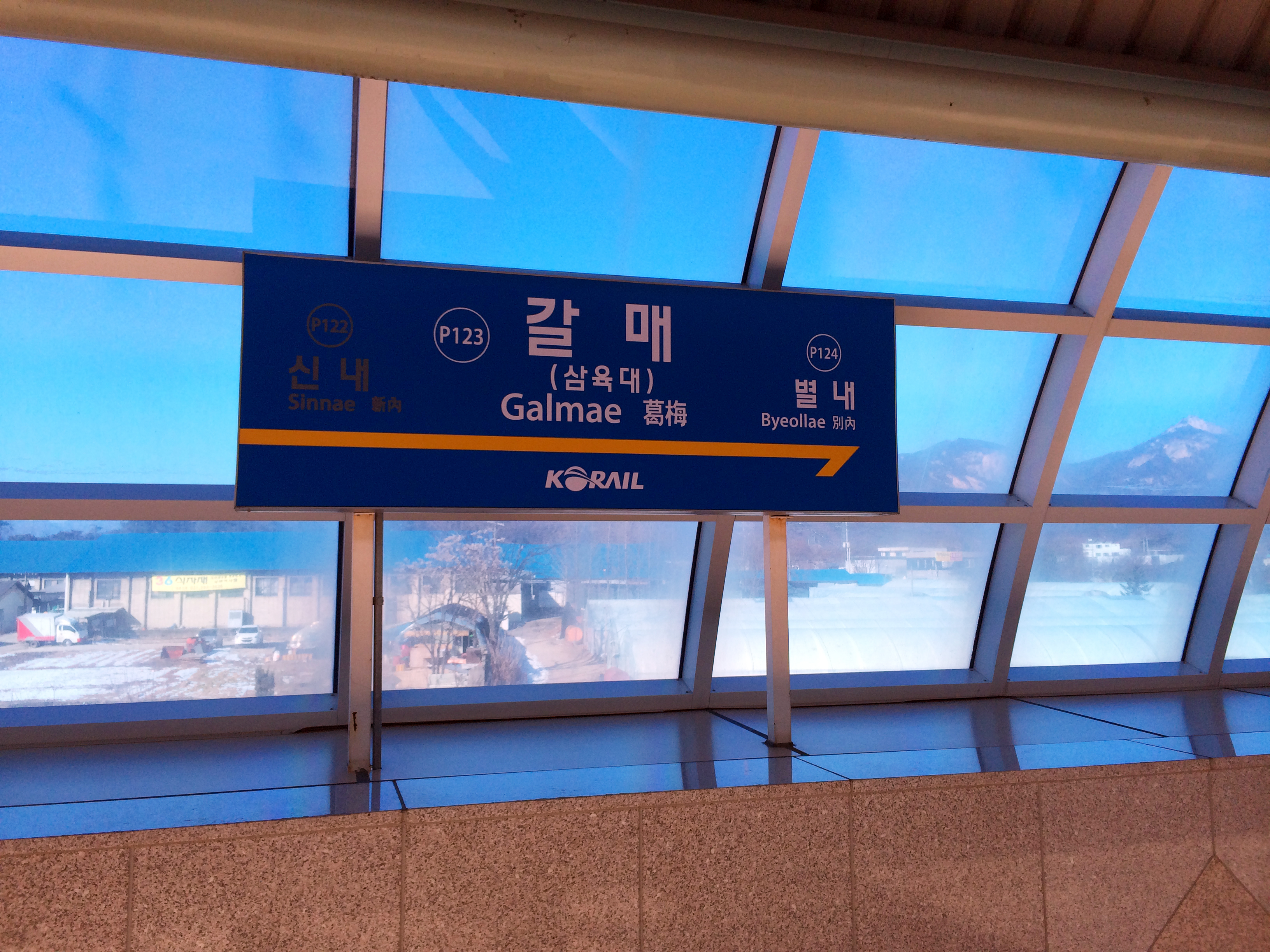 갈매역 역명판